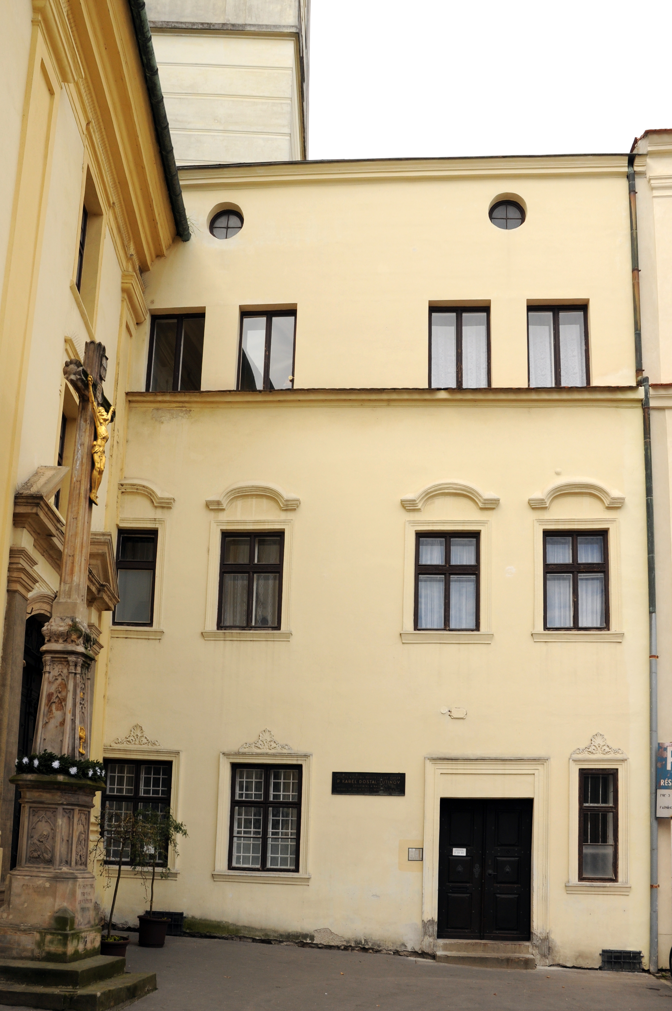 Fara (Prostějov), Filipcovo nám. 20, Prostějov